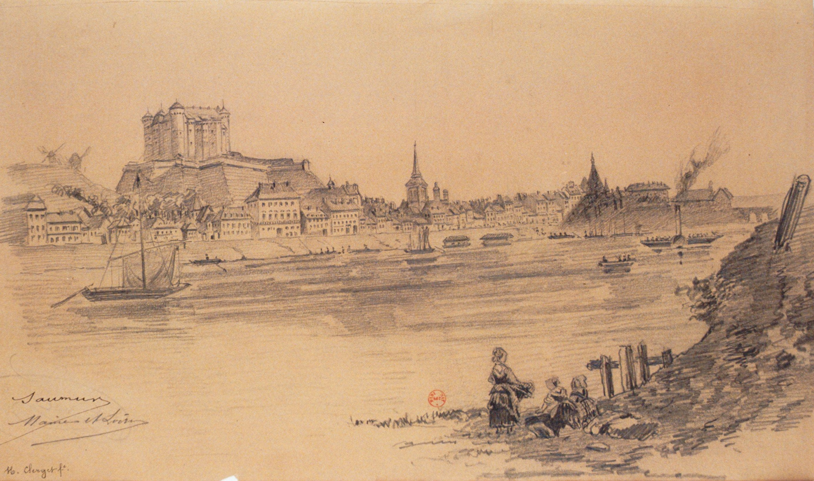 Saumur. Maine-et-Loire, dessin de Clerget, Hubert (1818-1899)